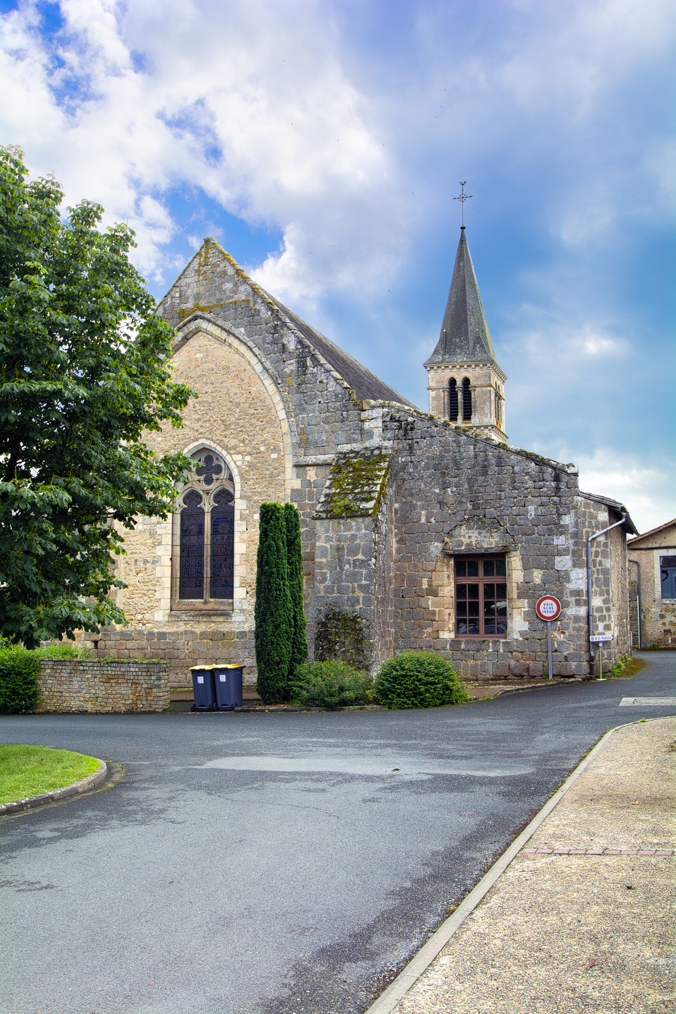 Église St-Jean-Baptiste (Ménigoute) Exposed E.jpg